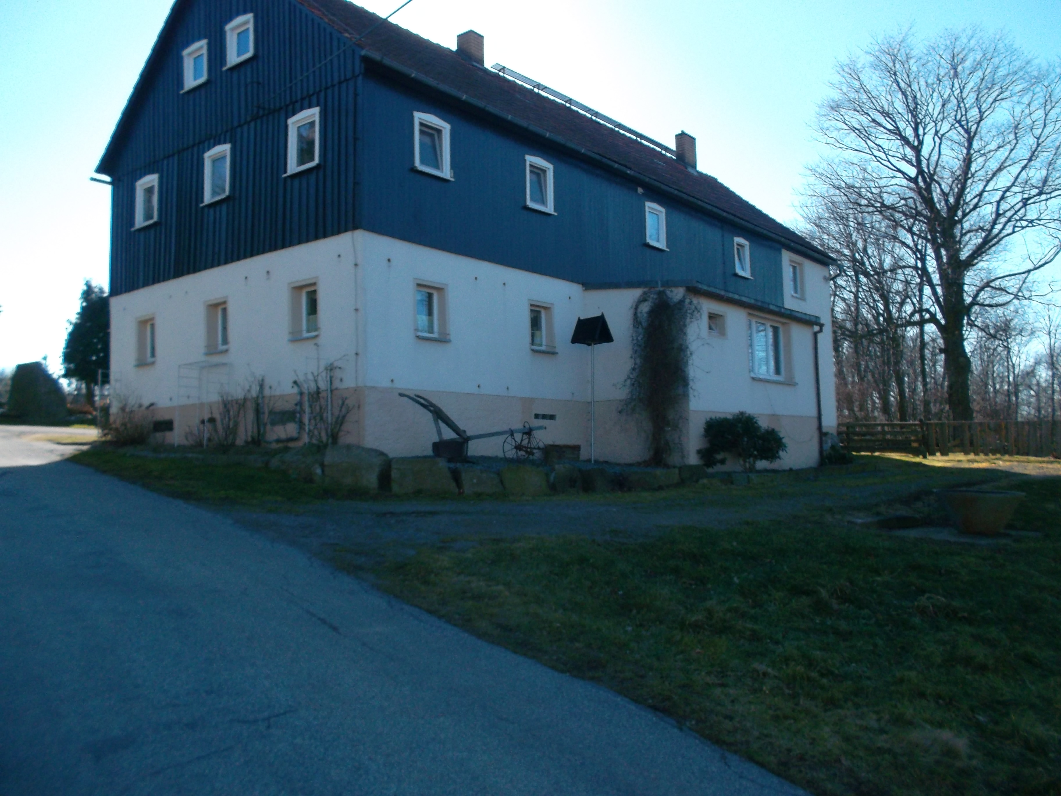 ein saniertes Umgebinde Haus (Soraer Straße)